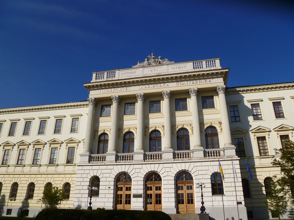 Університет "Львівська Політехніка" 2013